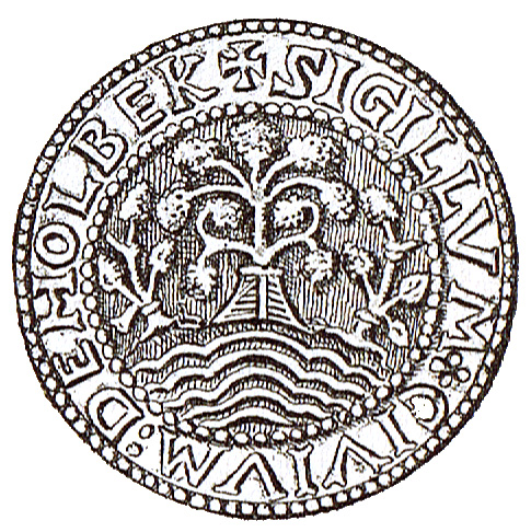 Holbæks Købstadssegl